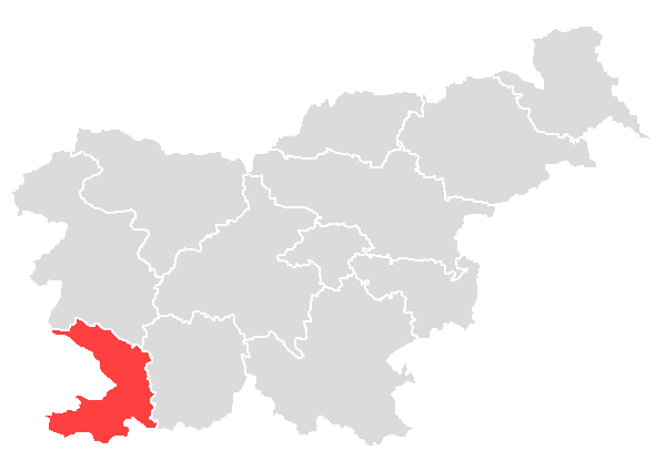 SURS